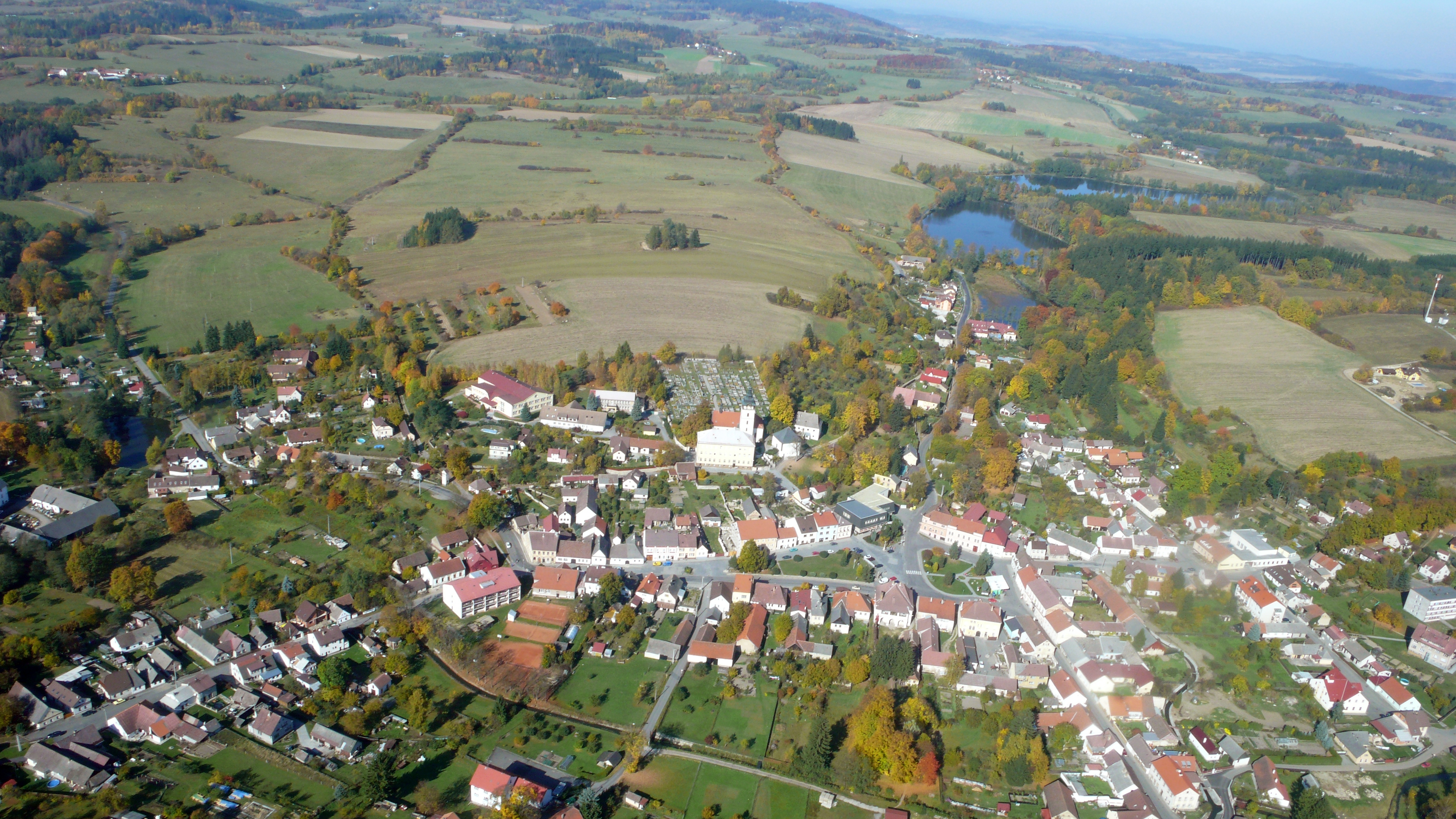 Jistebnice